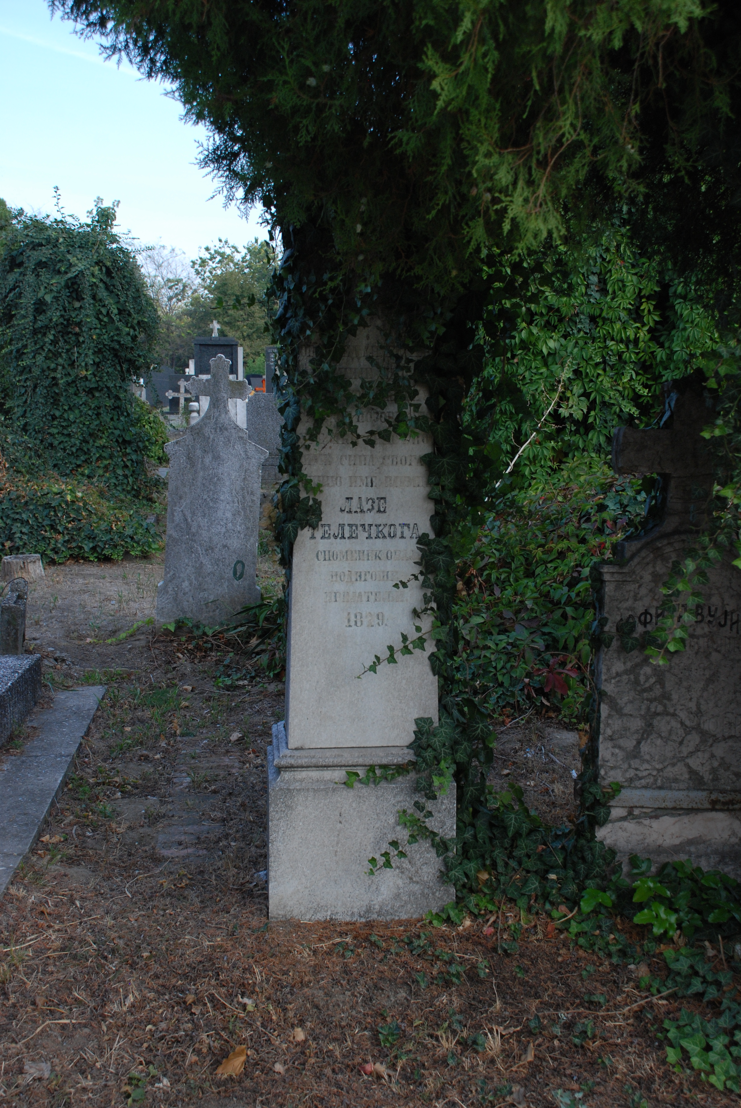 1849-1879, глумац и редитељ СНПа у Новом Саду, преводилац, написао неколико драма, заслужан за развој српског глумишта, један од најбољих глумаца свог времена